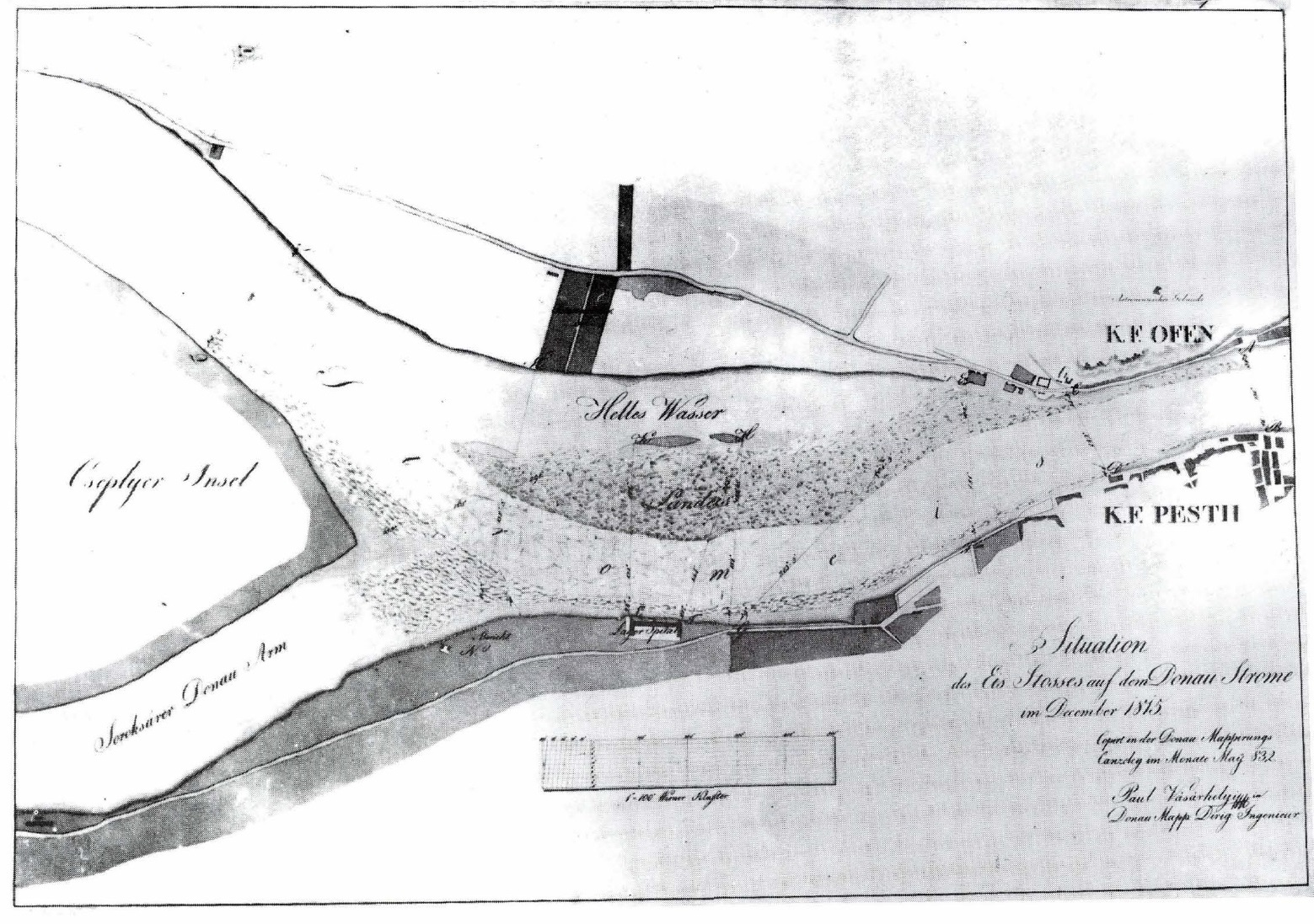 Korabeli térkép 1815-ből a Duna kiszélesedő medrének vonaláról, a Kopasz-zátony és a Csepel-sziget előtt. A pest-budai alsó Duna-szakasz vízrajzi térképe (a zajló és az álló jég helyszínrajza). 1815. [Eklér József.] A Duna-térképezési hivatalban 1832-ben készült másolat [Eklér,Josef]: „Situation des Eis Stesses auf dem Donau Strome im December 1815. Copirt in der Donau Mappirungs Canzeley im Monate May 832". Kol. Hz. 520x740 mm. Inv. 52.37.1.